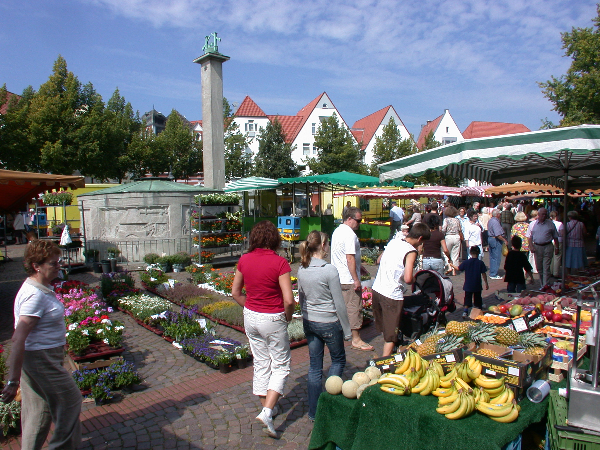 Deutschland - Nordrhein-Westfalen - Kreis Lippe - Bad Salzuflen: Wochenmarkt auf dem Salzhof